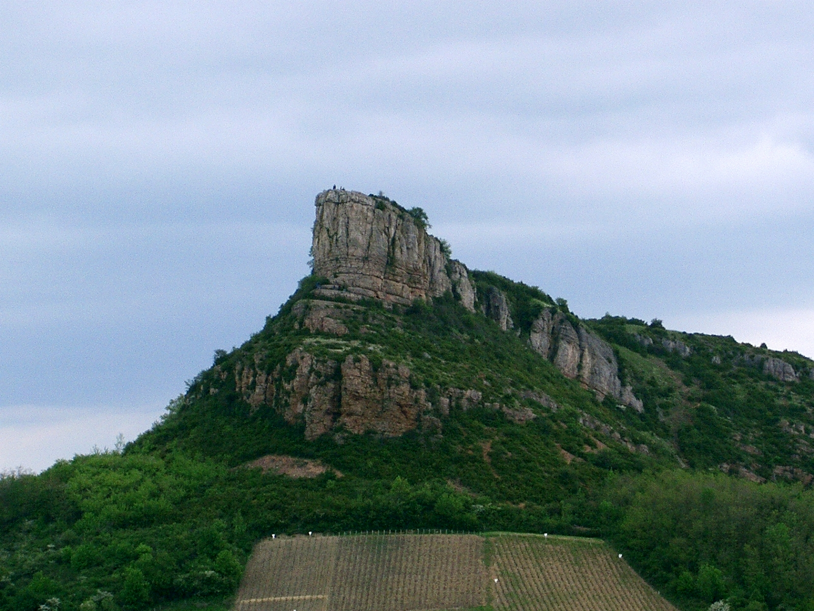 Roche de Solutré (71) Bourgogne